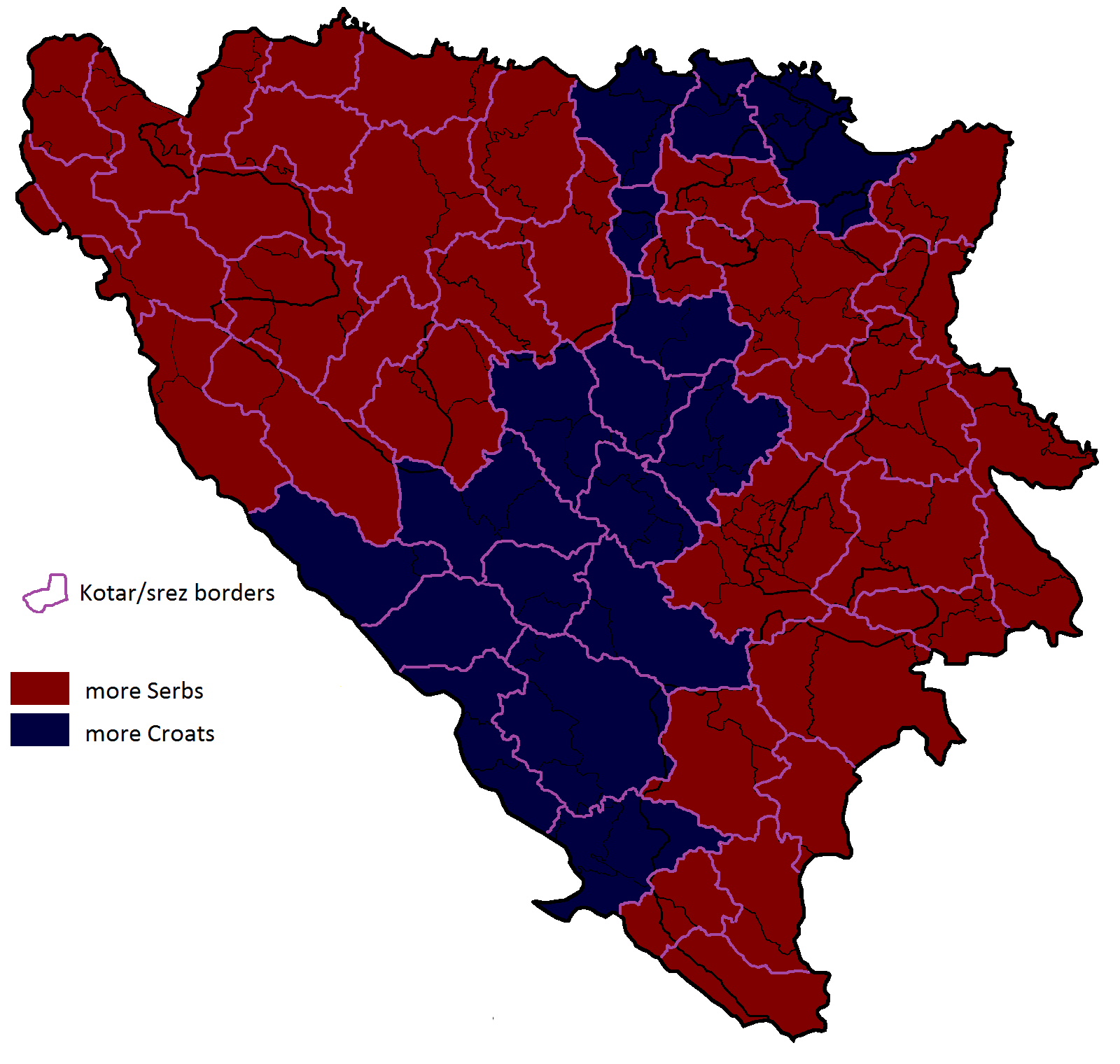 Omjer Hrvata i Srba po popisu iz 1931.